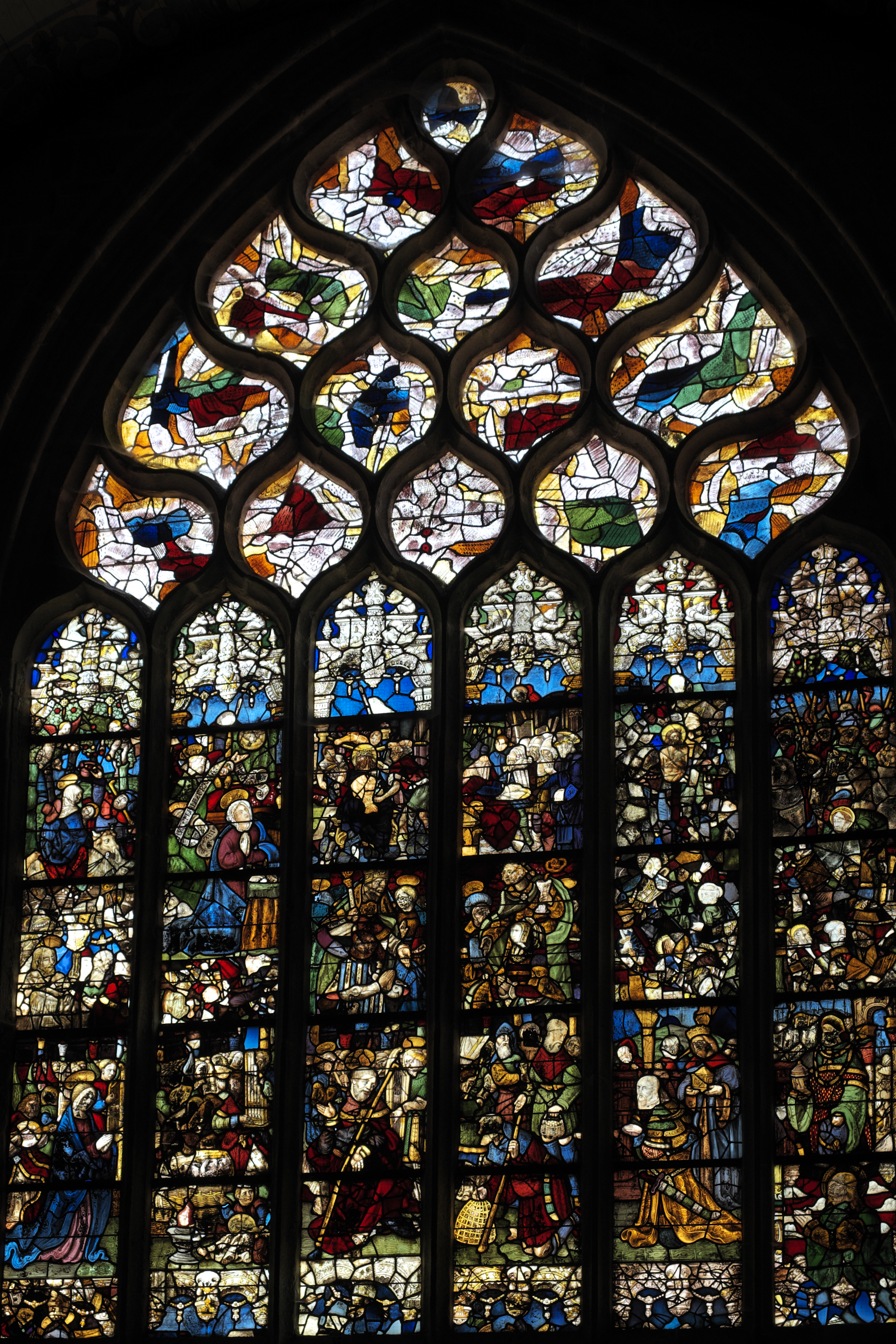 Ehemalige Stiftskirche Notre-Dame-de-Roscudon in Pont-Croix im Département Finistère (Region Bretagne/Frankreich), Bleiglasfenster aus dem 16. Jahrhundert; Darstellung: Passion Christi